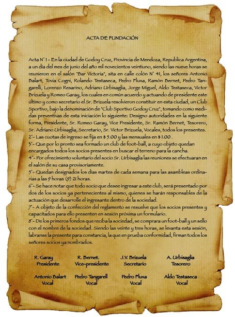 Acta de fundación del Club Sportivo Godoy Cruz de Mendoza, Argentina.